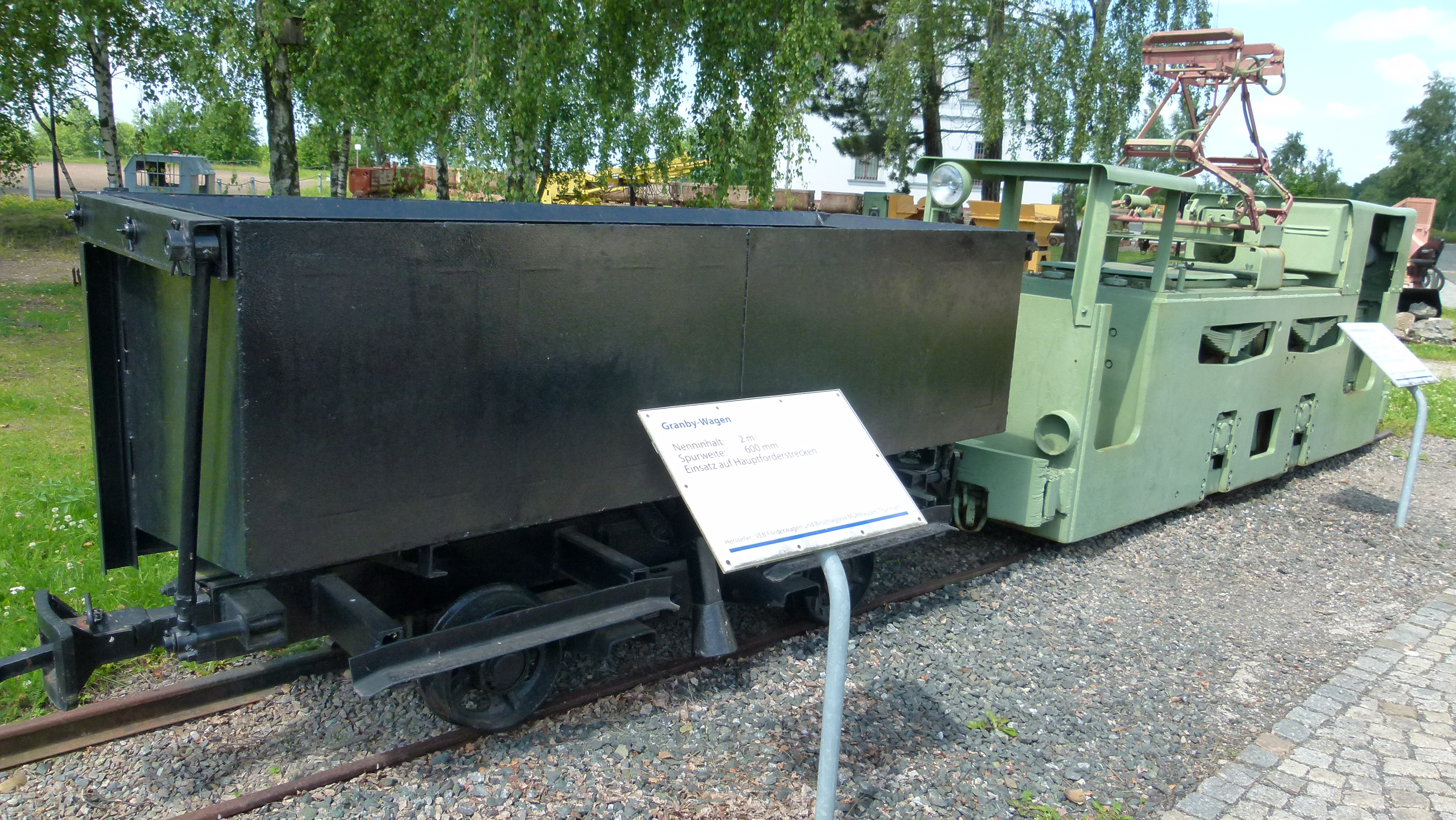 Schacht Reiche Zeche, Bergbautechnologie, Freiberg, Sachsen